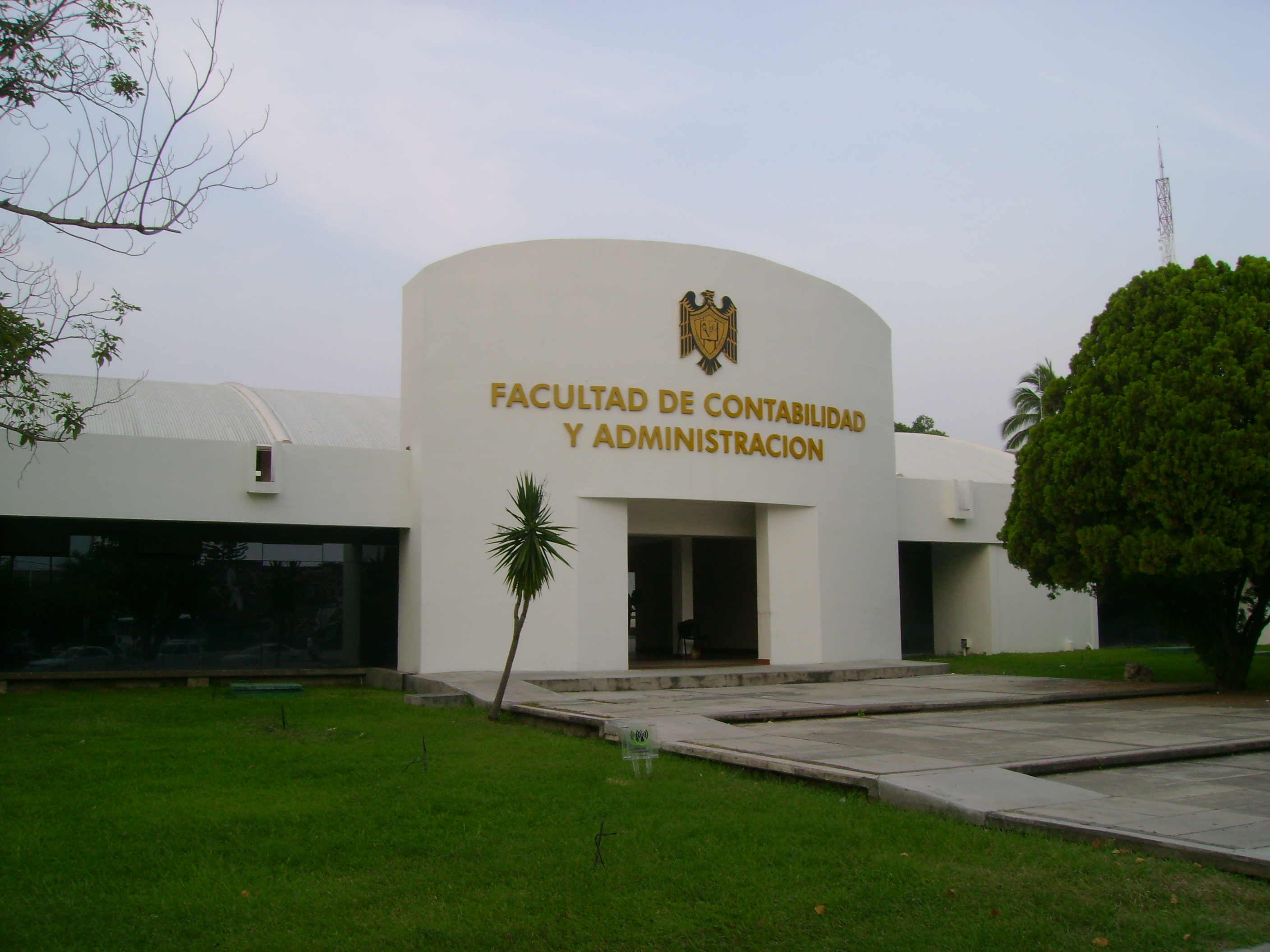 Facultad de Contabilidad y Administracion de la Universidad de Colima.